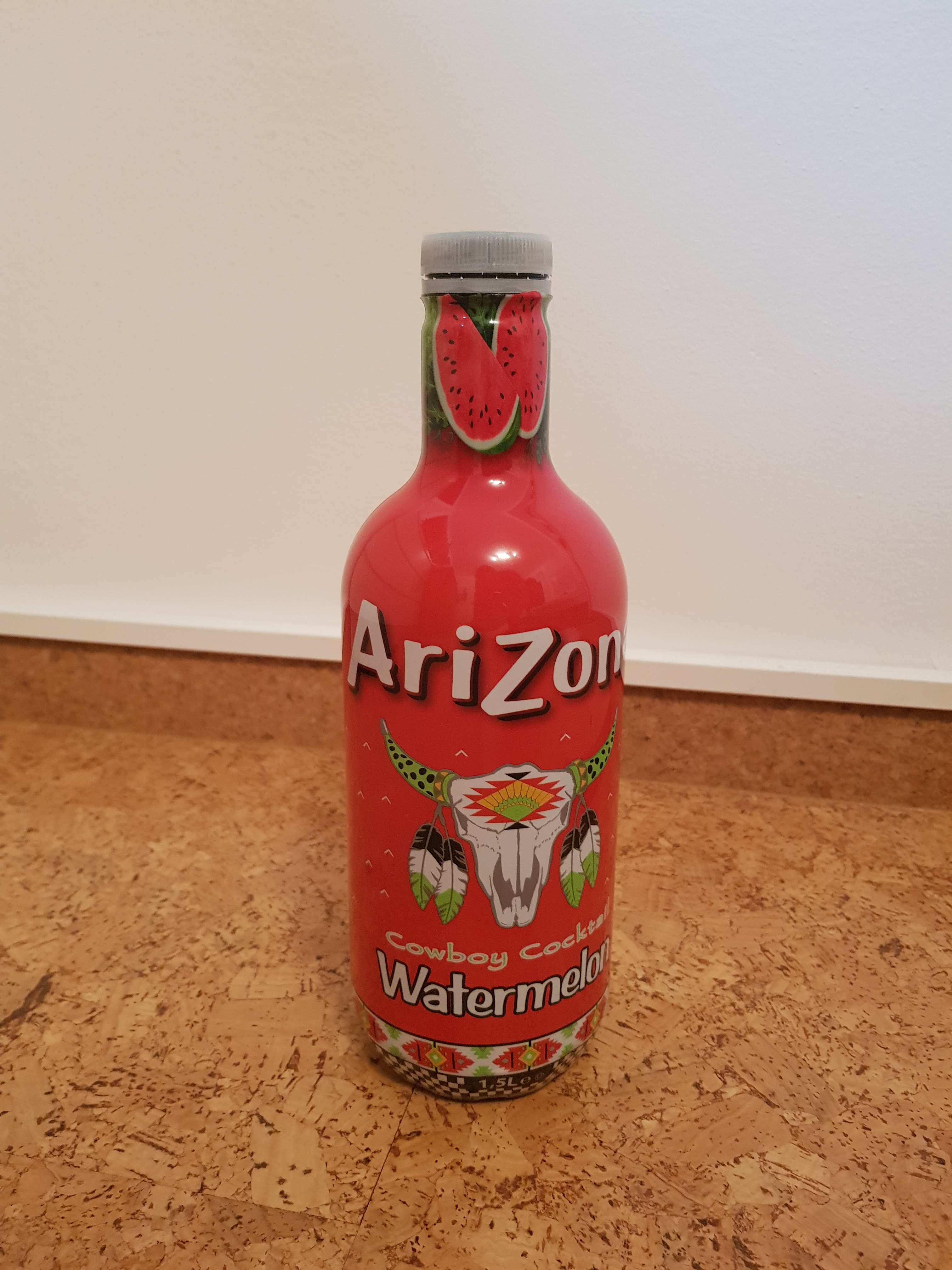 Saftgetränk von AriZona mit typisch auffälligem Produktdesign